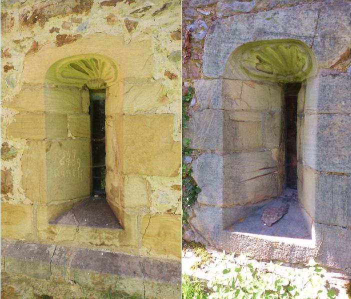 Ventanas este y oeste con concha de peregrino labrada en piedra en parte superior